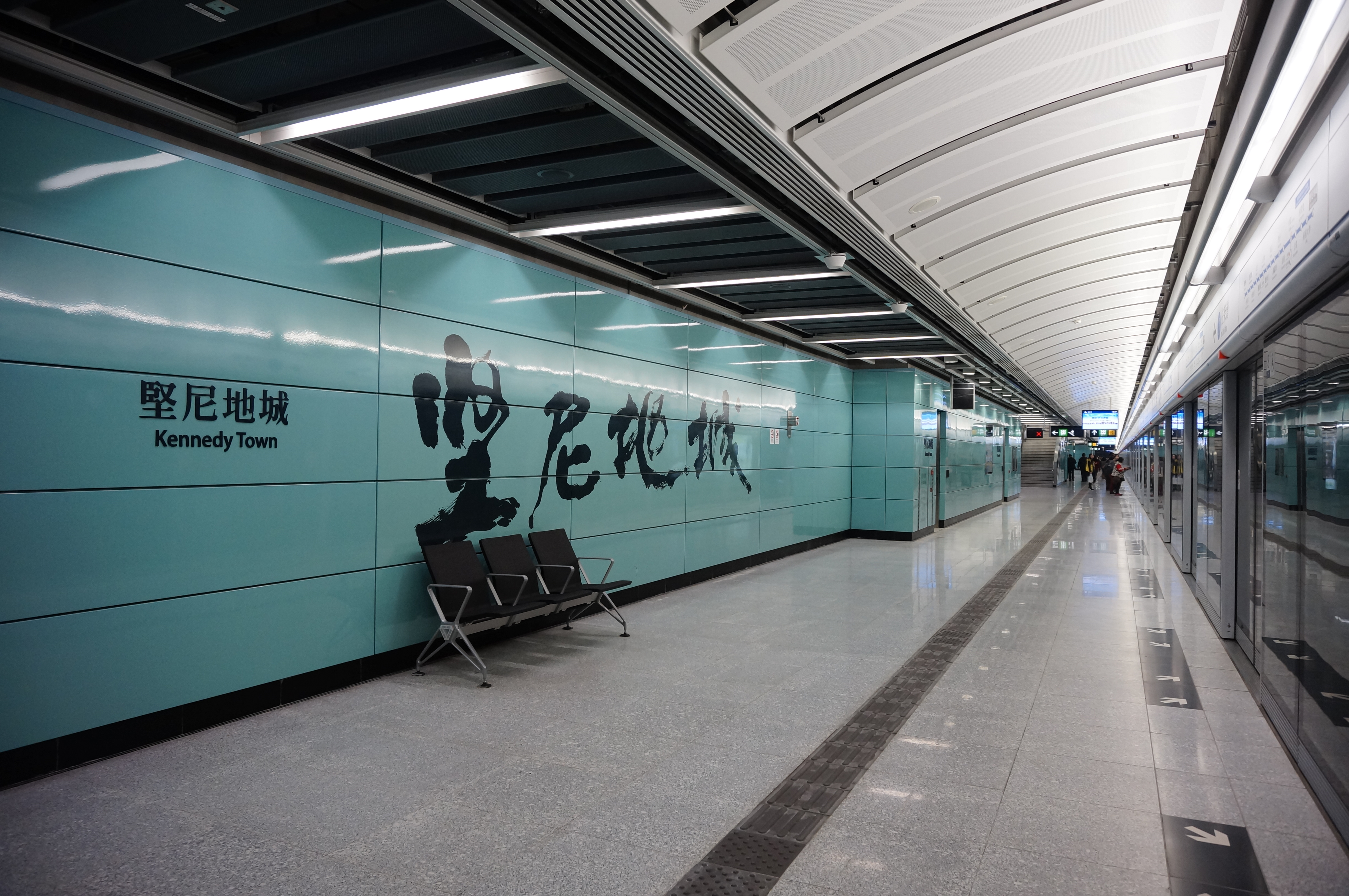 中文（香港）: 港鐵堅尼地城站月台